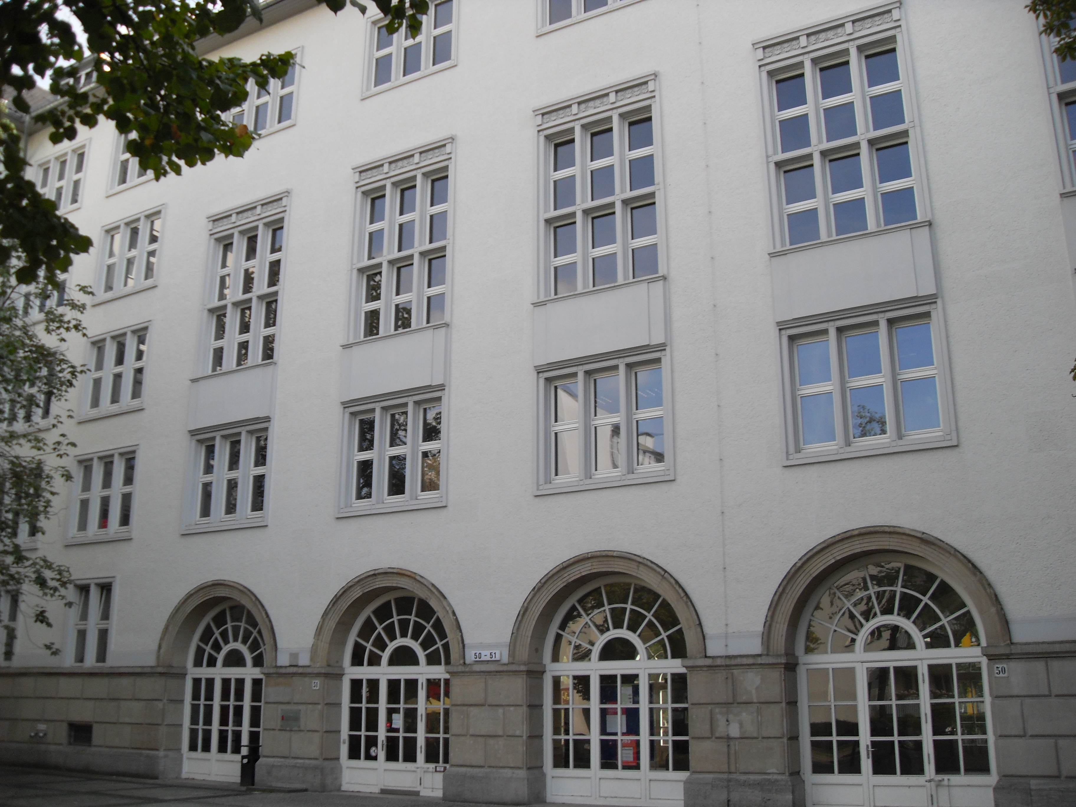 Campus Schöneberg Haus B